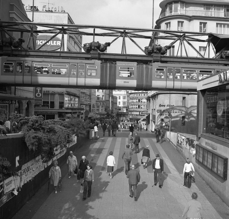 Wuppertal: Fußgängerzone "Alte Freiheit" mit Schwebebahn an der Haltestelle Döppersberg